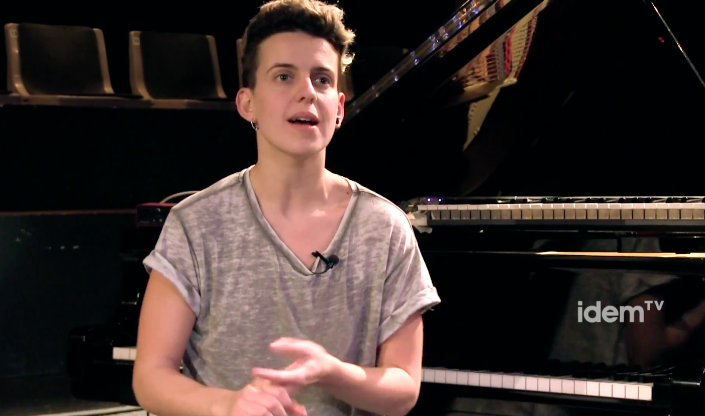 Clara Peya, entrevistada per idem tv, com pianista i col·laboradora a l'espectacle de teatre "Limbo", al Teatre Gaudí (Barcelona), el 15 de febrer de 2015.